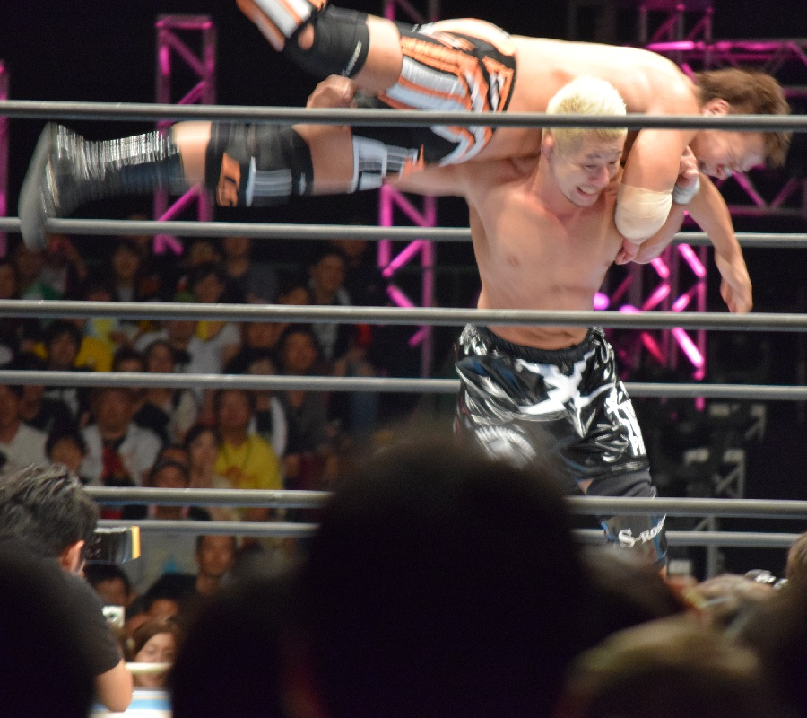 2015年8月1日 大阪府立体育会館 「G1 CLIMAX 25」 小島聡にマイアミ・シャインを放つ高橋裕二郎